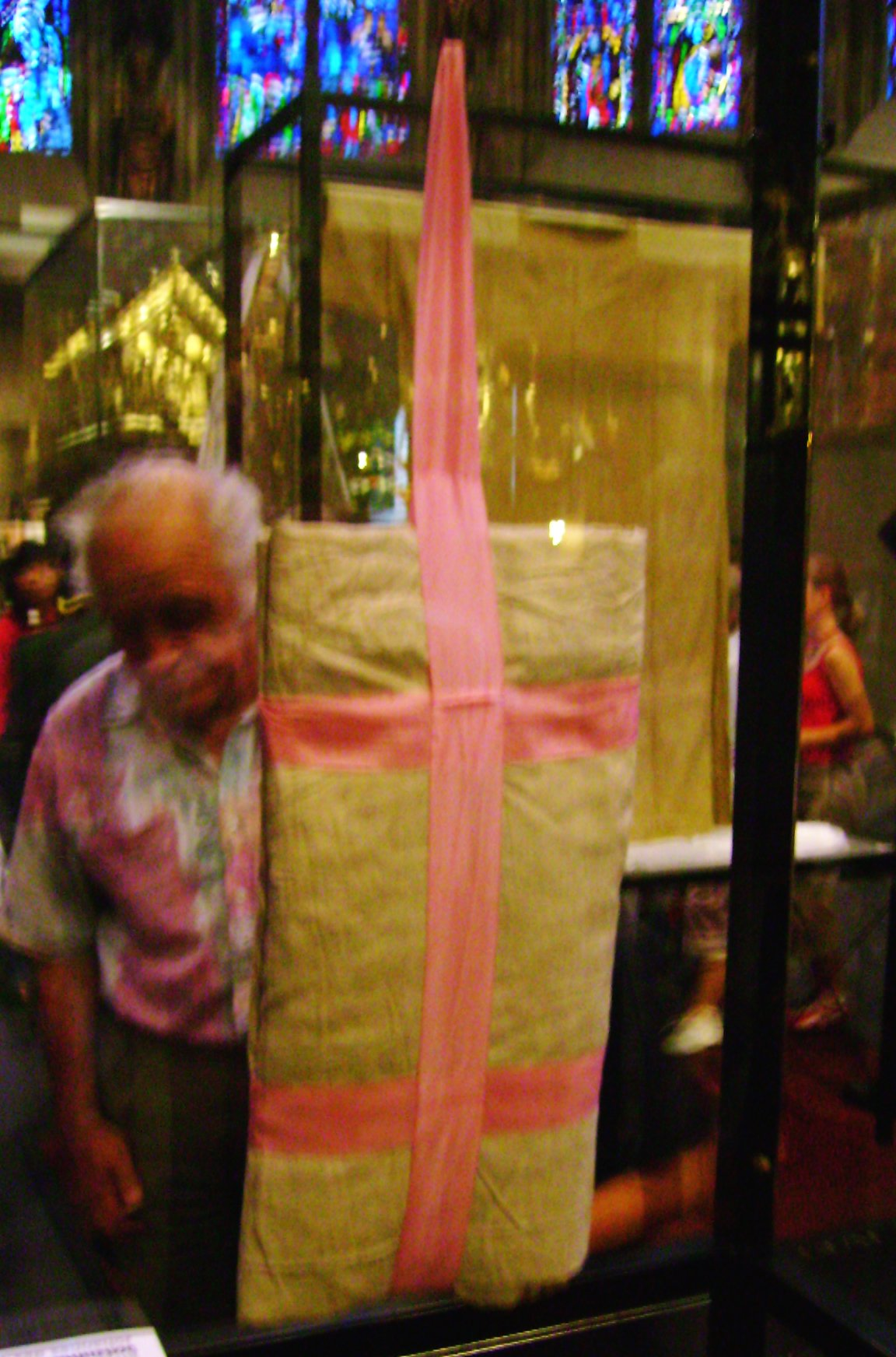 Enthauptungstuch Johannes des Täufer, Zeigung im Aachener Dom während der Heiligtumsfahrt 2007 / Decaptationcloth of John the Baptist, shown at the Aachen cathedral during th 2007 pilgrimage